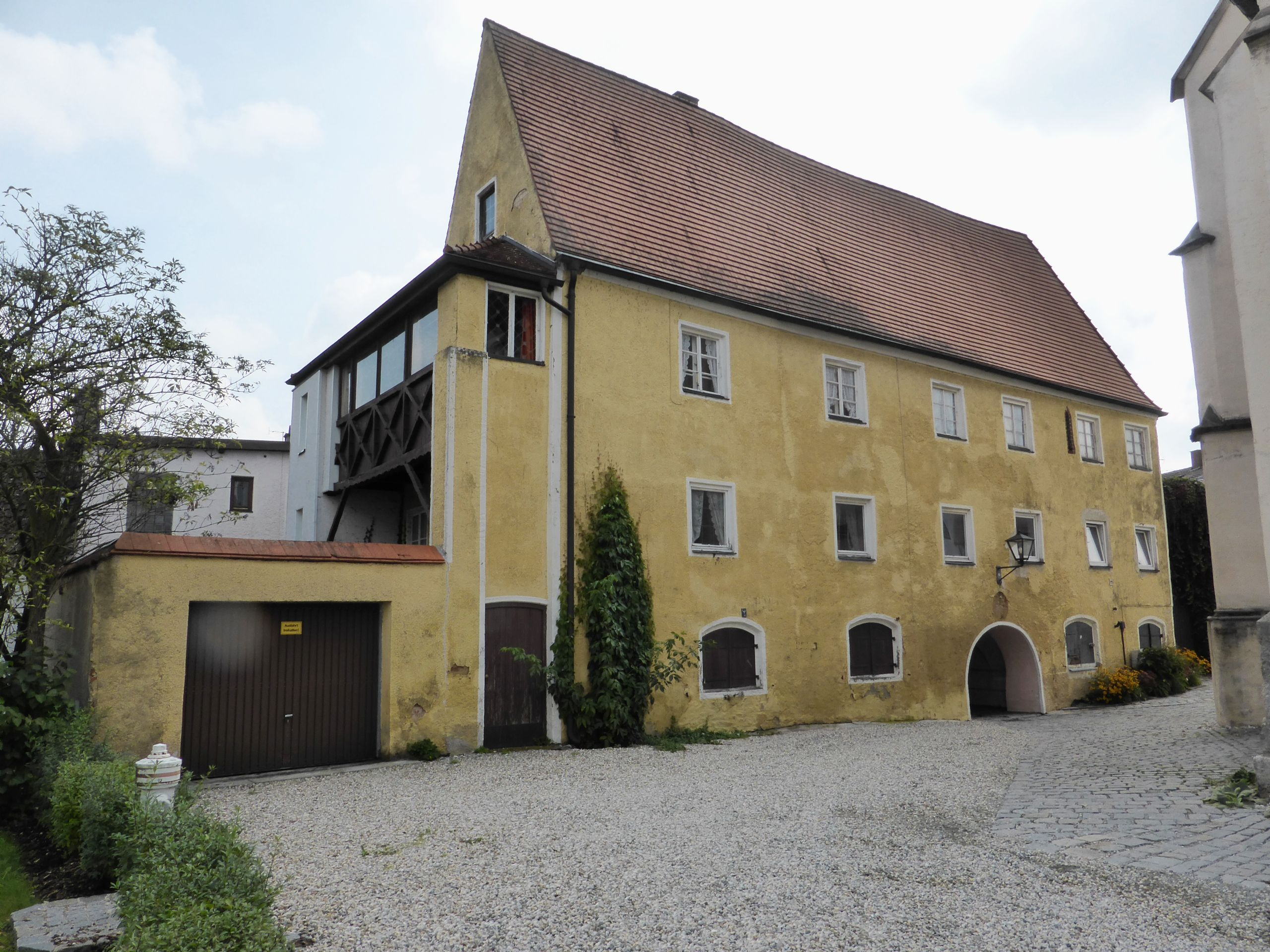 Hofmarkschloss Triftern